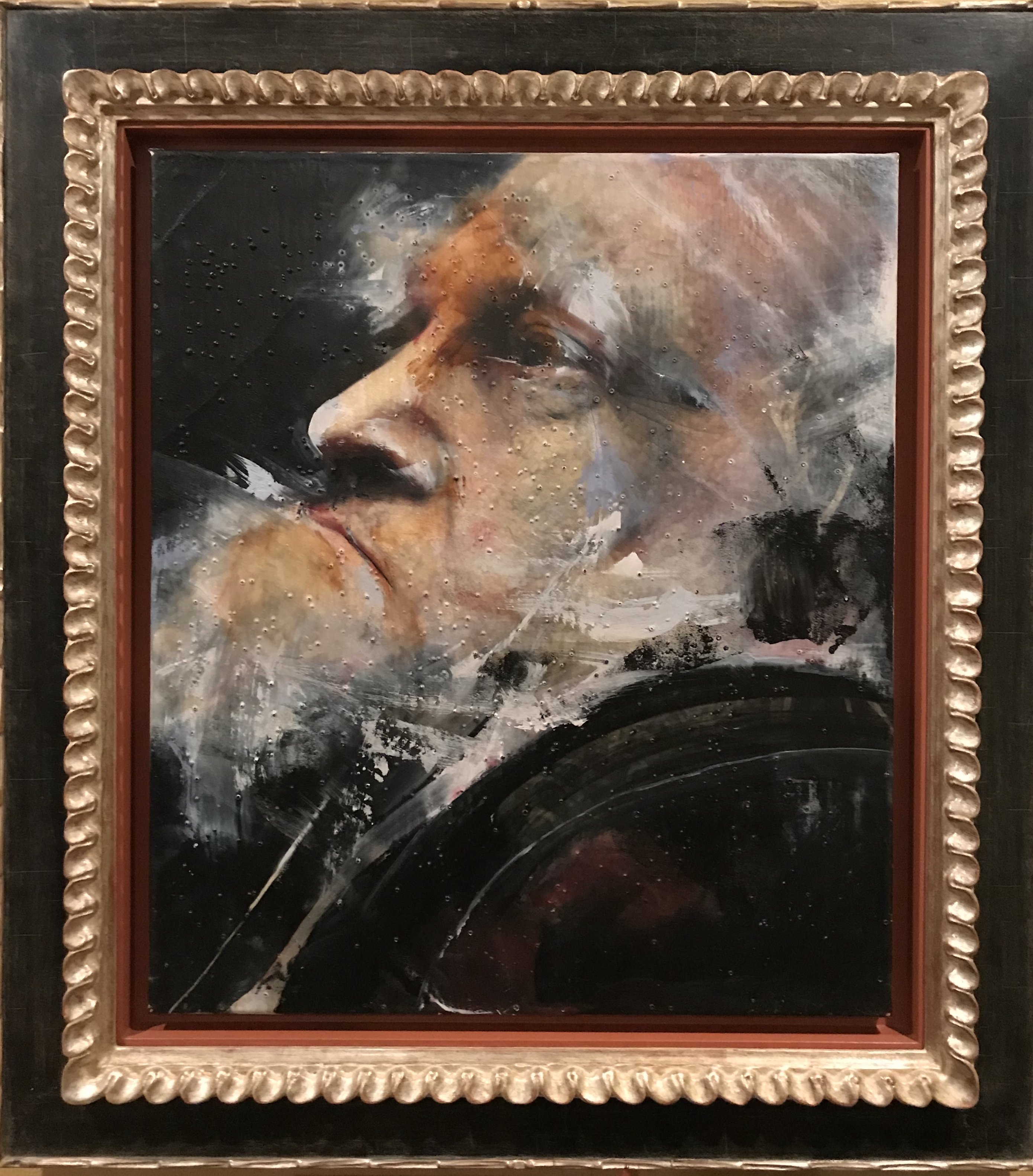 Origineel werk (privé collectie) uit serie Don Quijote_08 van Lita Cabellut